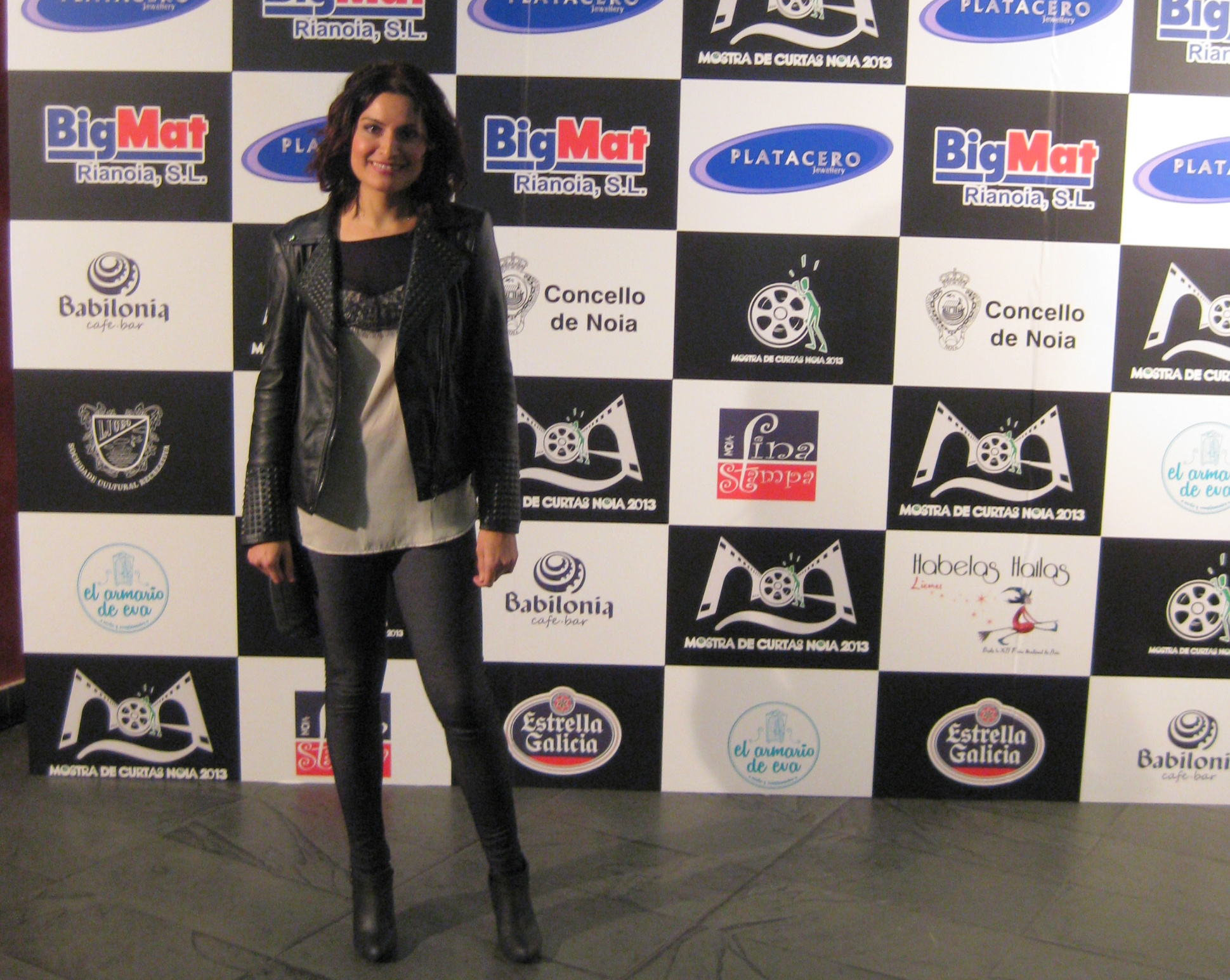 Ledicia Sola en 2013